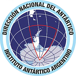 DAN-IAA logo transparente